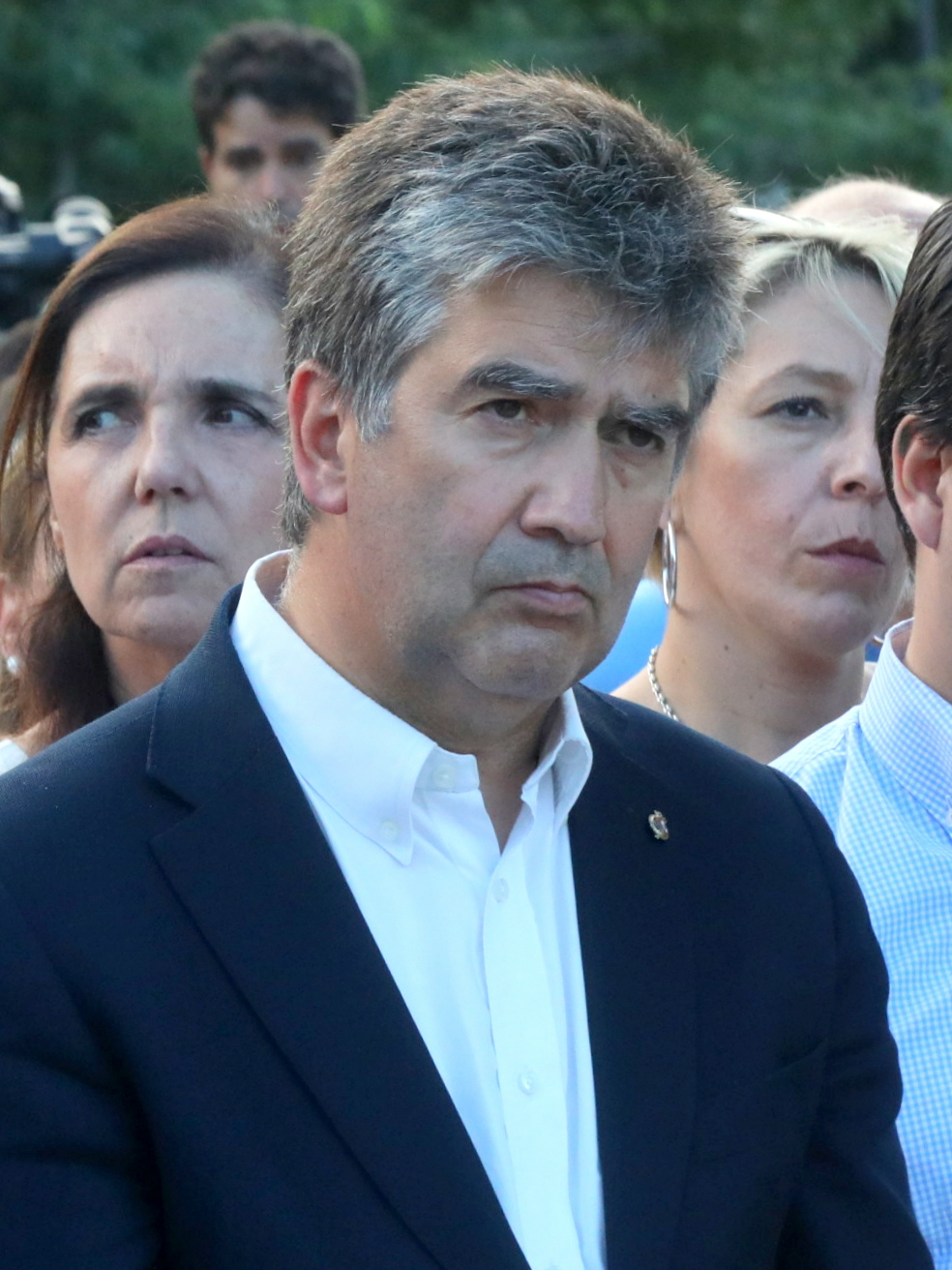 Homenaje en Madrid a Miguel Ángel Blanco en el vigésimo primer aniversario de su asesinato